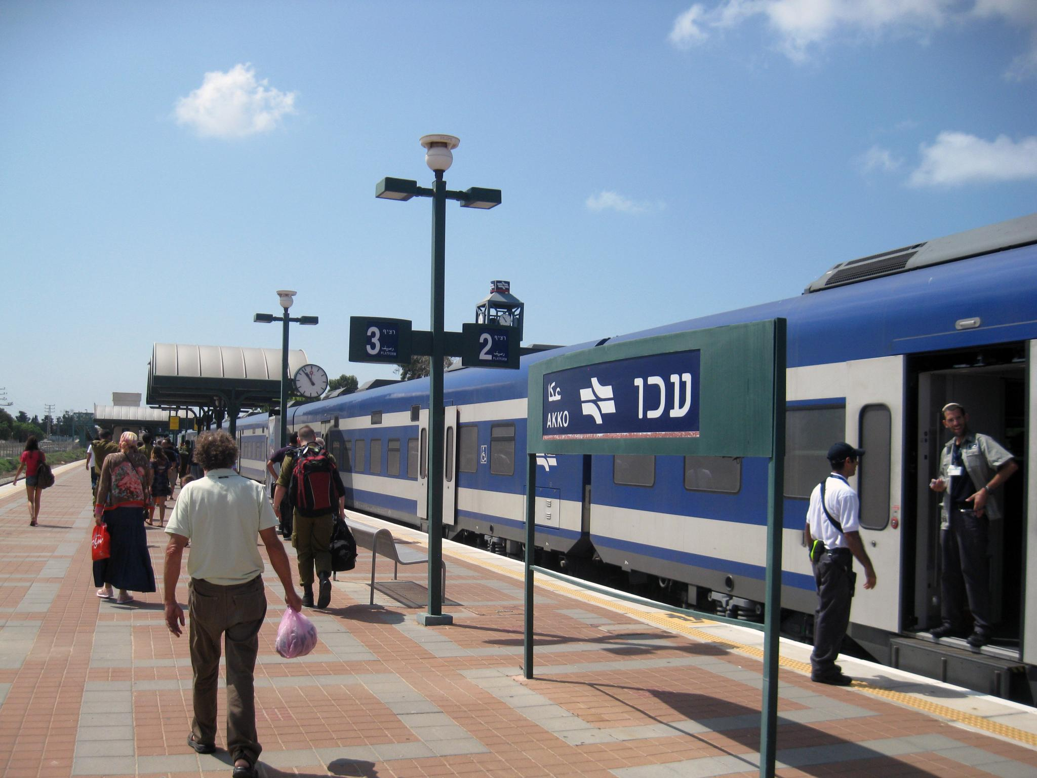 Bienvenidos a Akko! O Acre! O como quieras decirle :D Acre